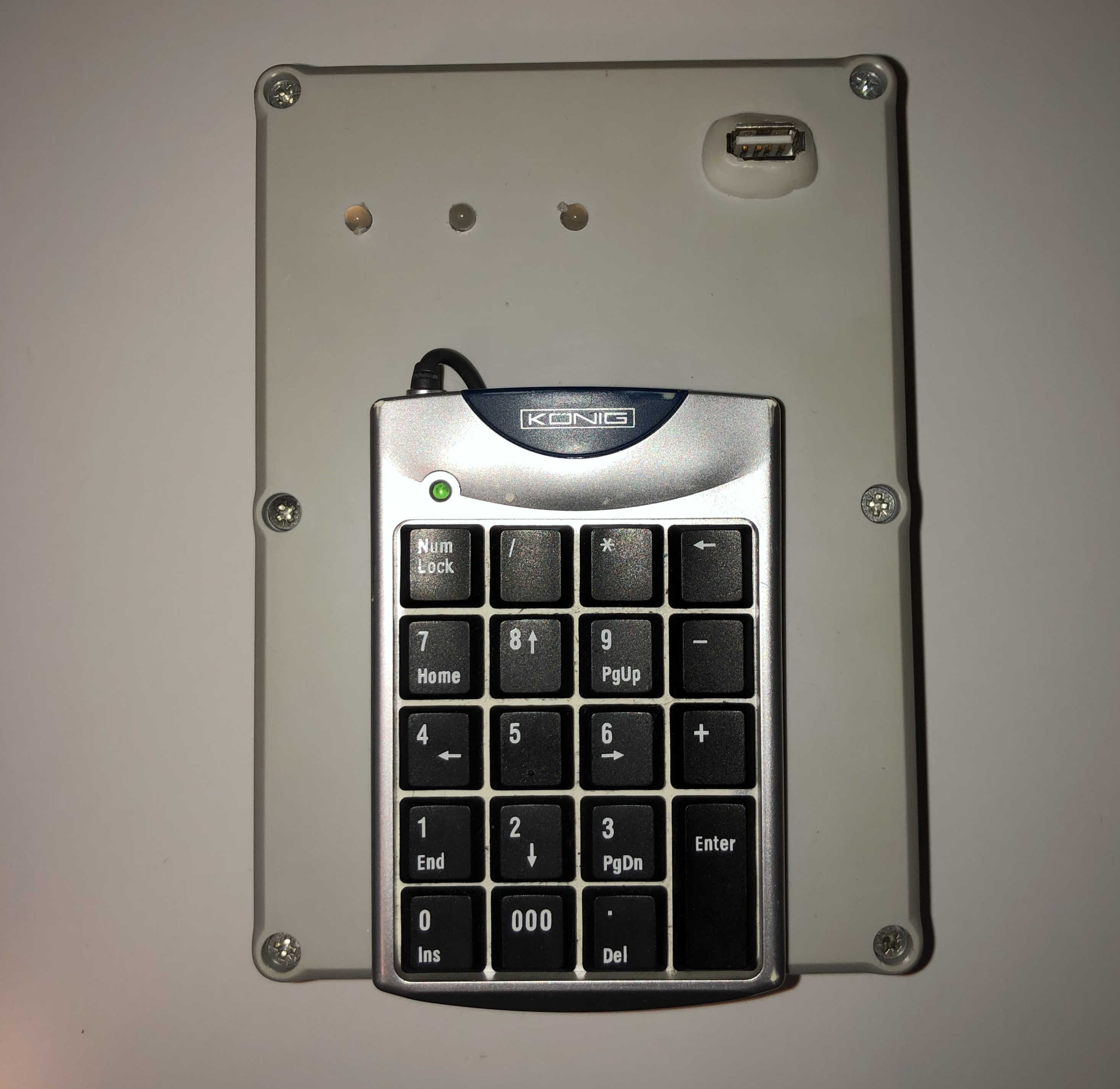 FX-laite